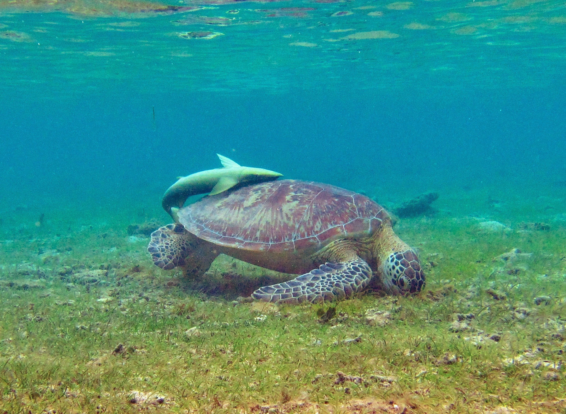 Une tortue verte Chelonia mydas (avec un rémora Remora remora) à Mayotte.